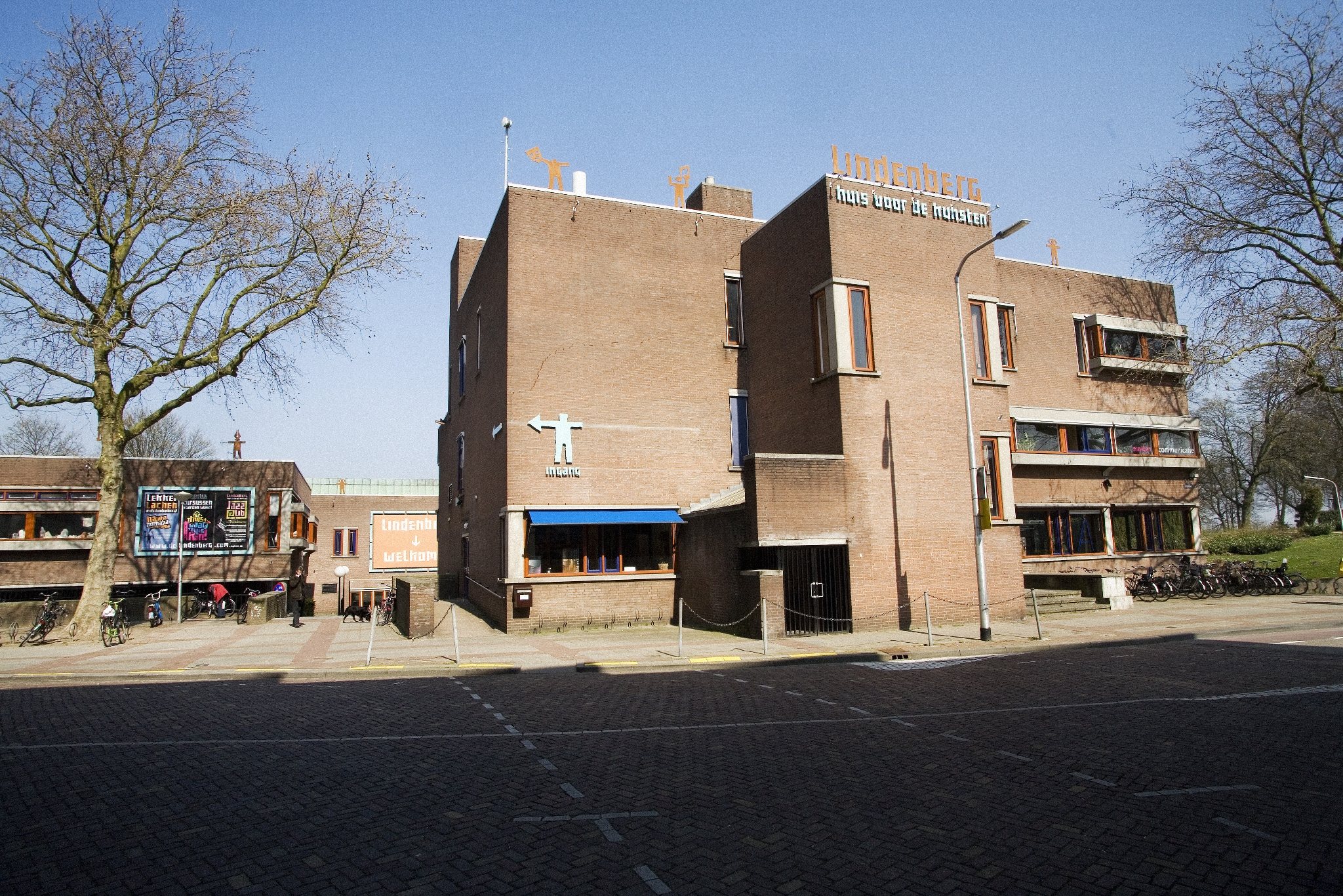 Lindenberg Nijmegen - foto Paul Breuker